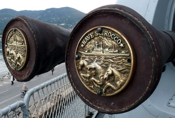 Tappi di volate del Dardo della fregata Scirocco